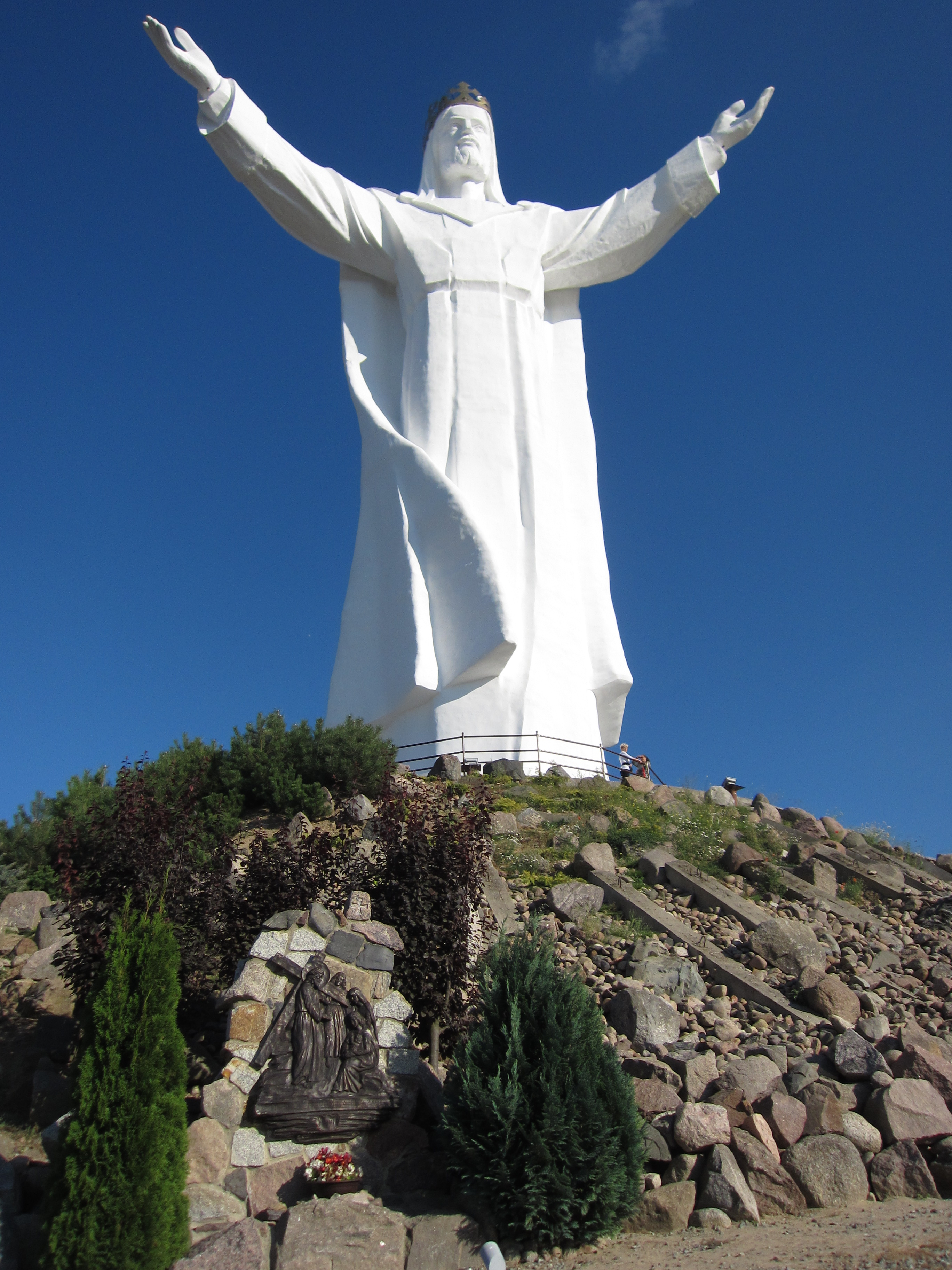 Christ the King Statue in Świebodzin